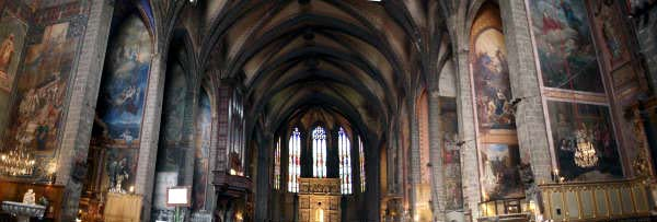 Montage photographique de l'intérieur de la cathédrale st Jean Baptiste de Perpignan avec vision d'ensemble des peintures murales de Jacques Pauthe (1866-1874).